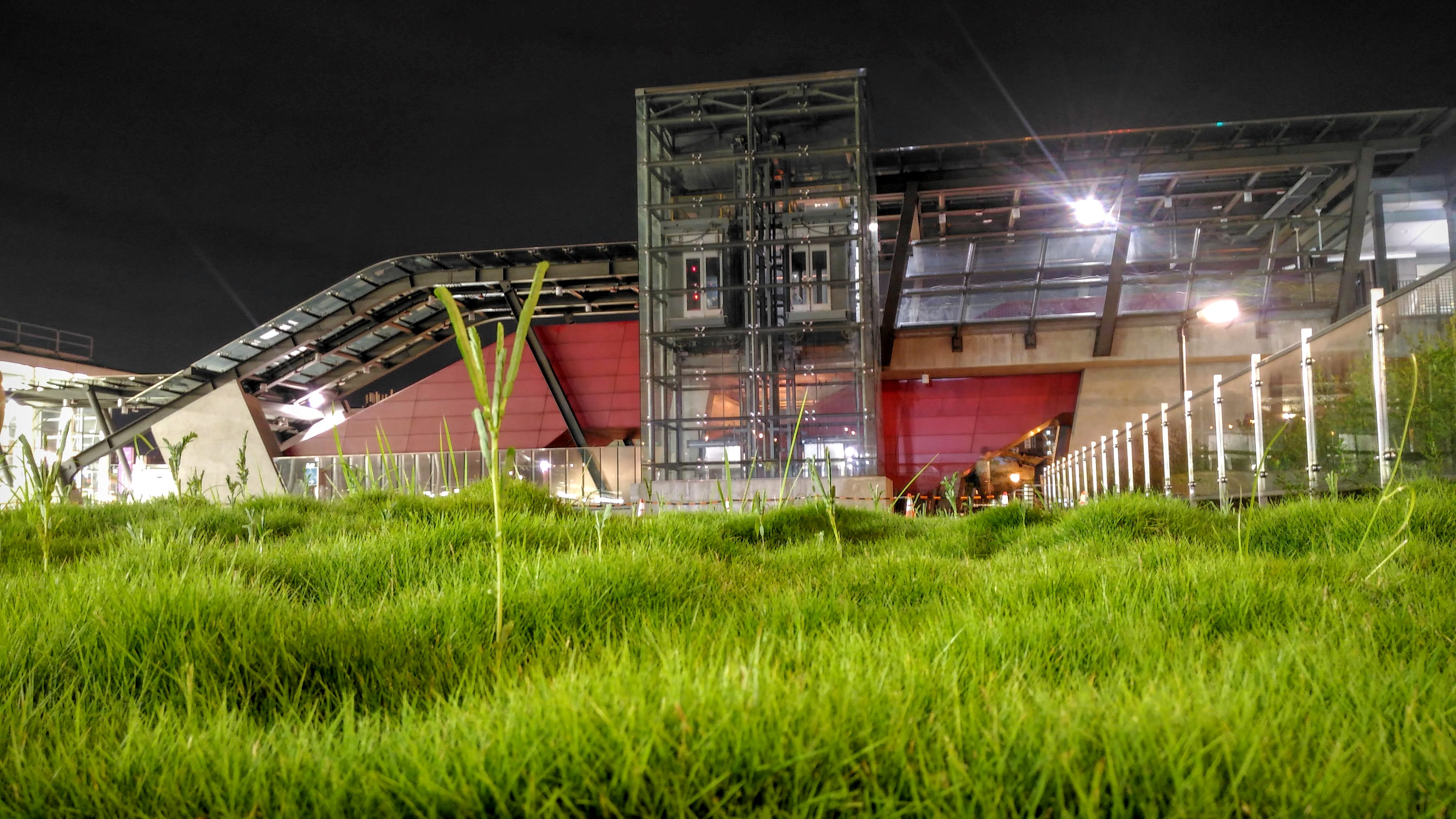 高鐵桃園站捷運與高鐵連接通道夜景